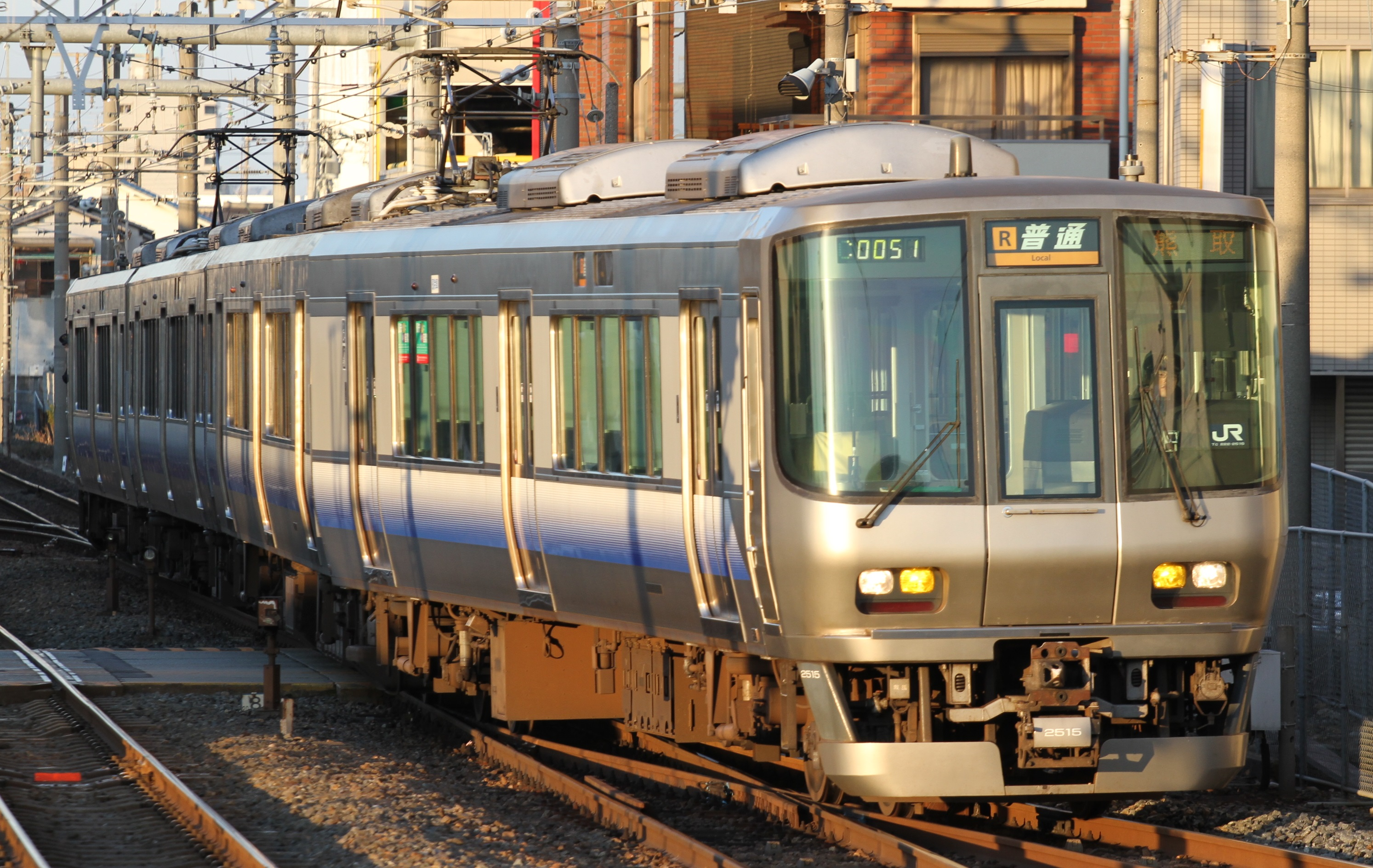 阪和線 223系2500番台 普通列車